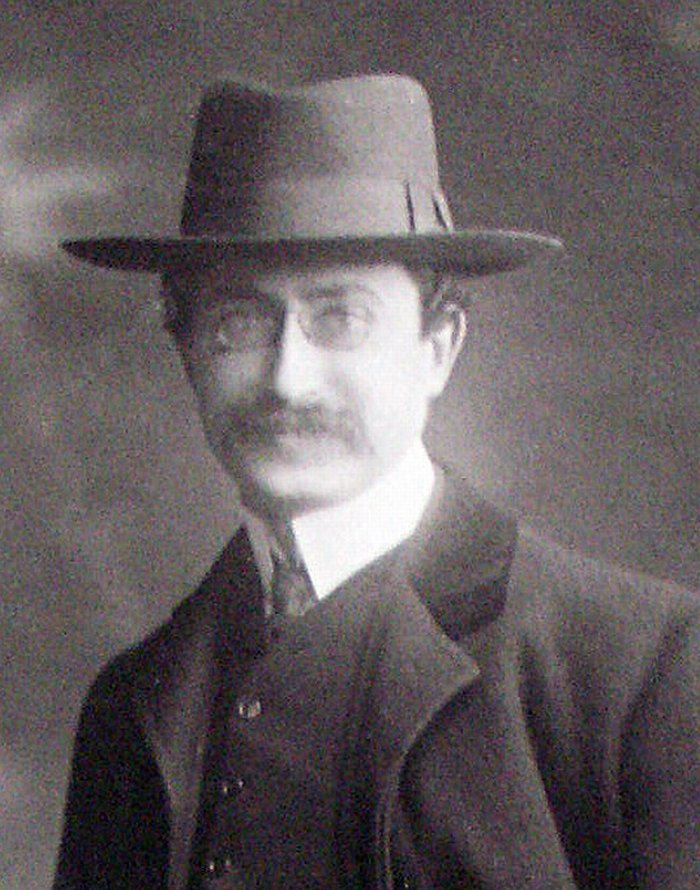 Léon Blum photographié par Frédéric Boissonnas et André Taponier, vers 1914.